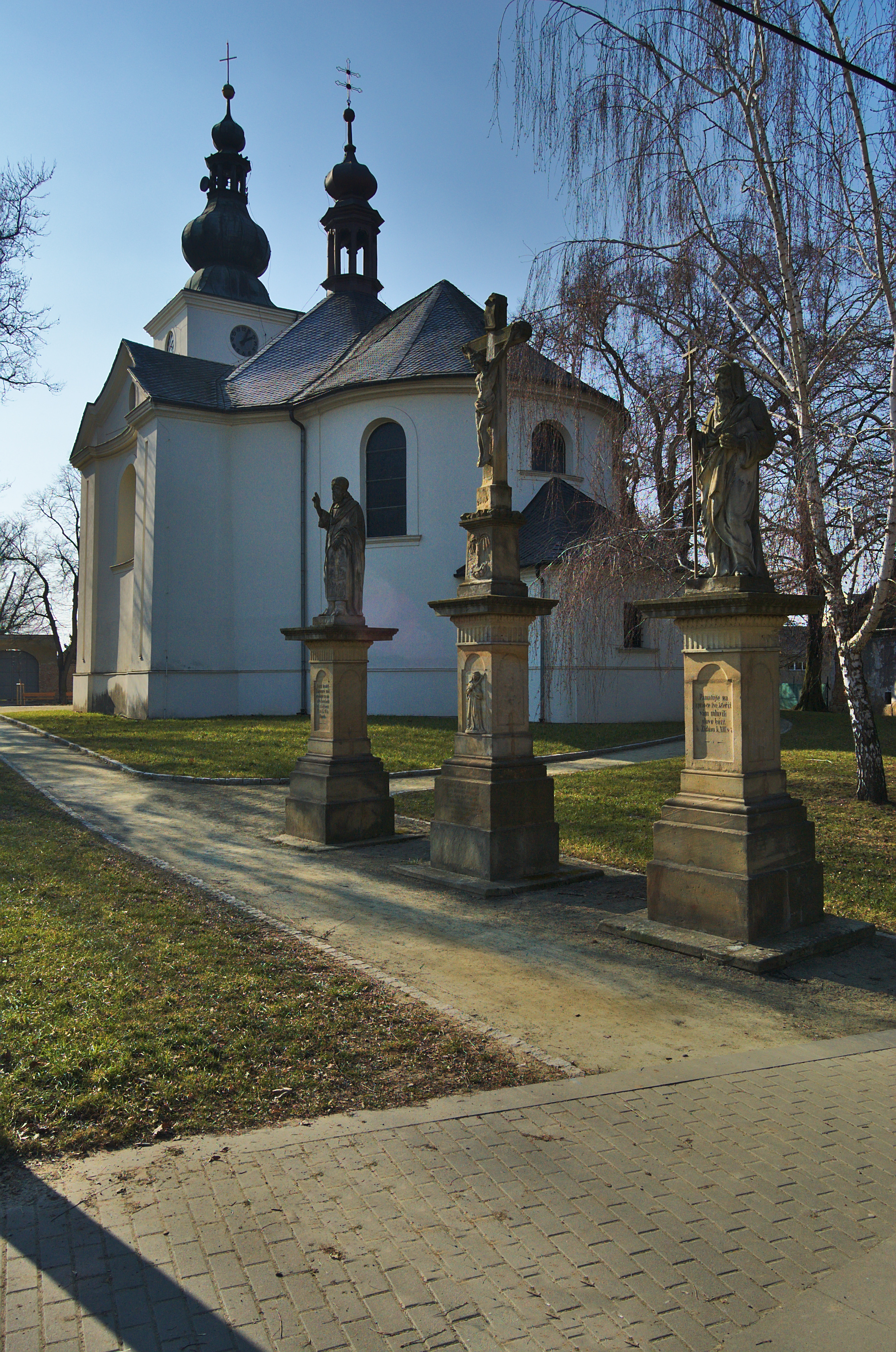 Sochy Cyrila a Metoděje a kříž na návsi, Olšany, okres Prostějov